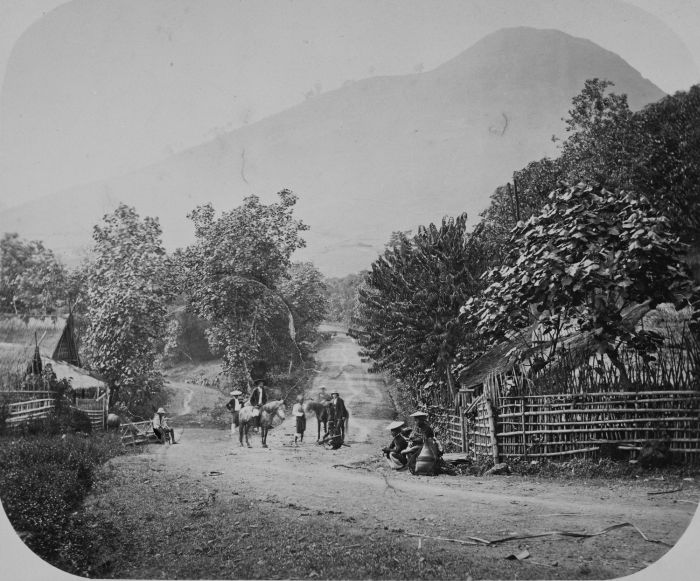 foto. Post Nagreg